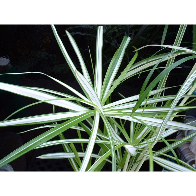 Հովանոցային արմավենու Variegatus տեսակ